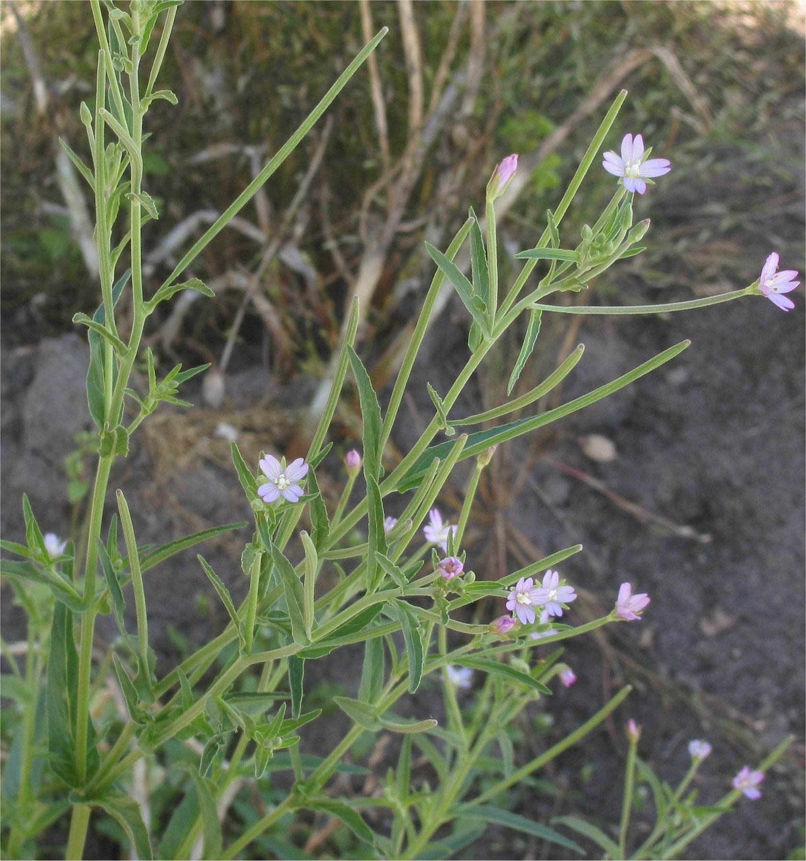 (Kantige basterdwederik bloeiwijze) Epilobium tetragonum